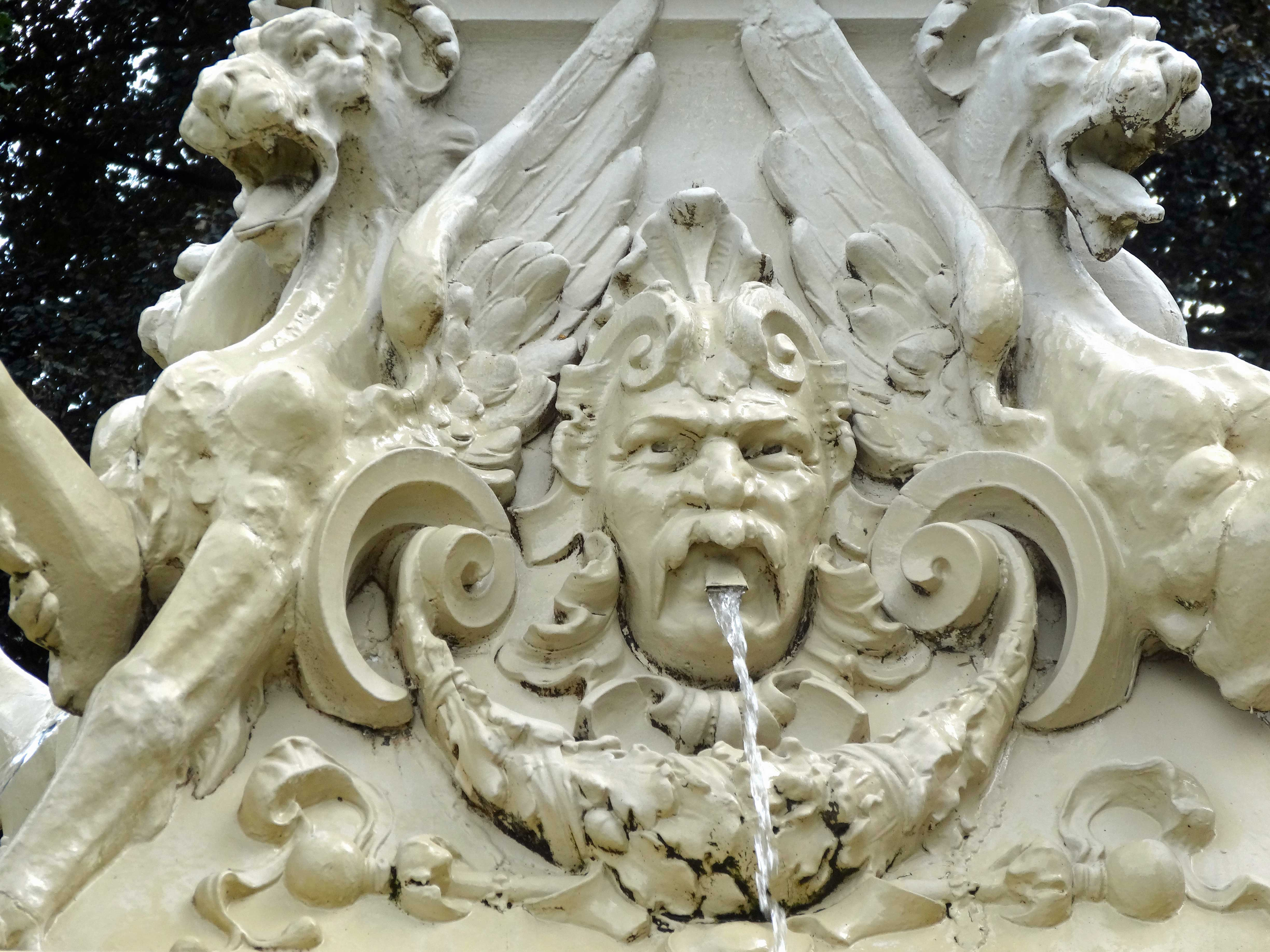 Nahuysfontein in Zwolle